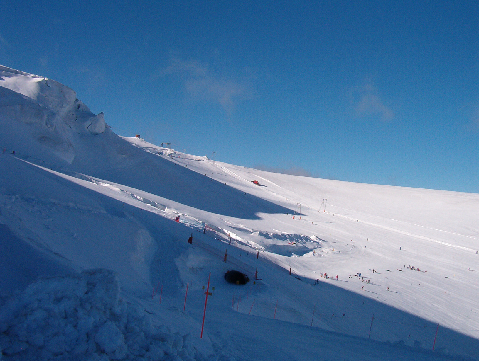 Sci estivo a Plateau Rosà - Monte Rosa - Svizzera